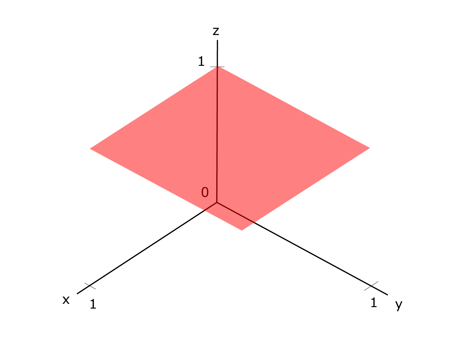 Kristall Ebene - Miller Inex